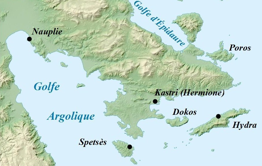 Iles argo-saroniques